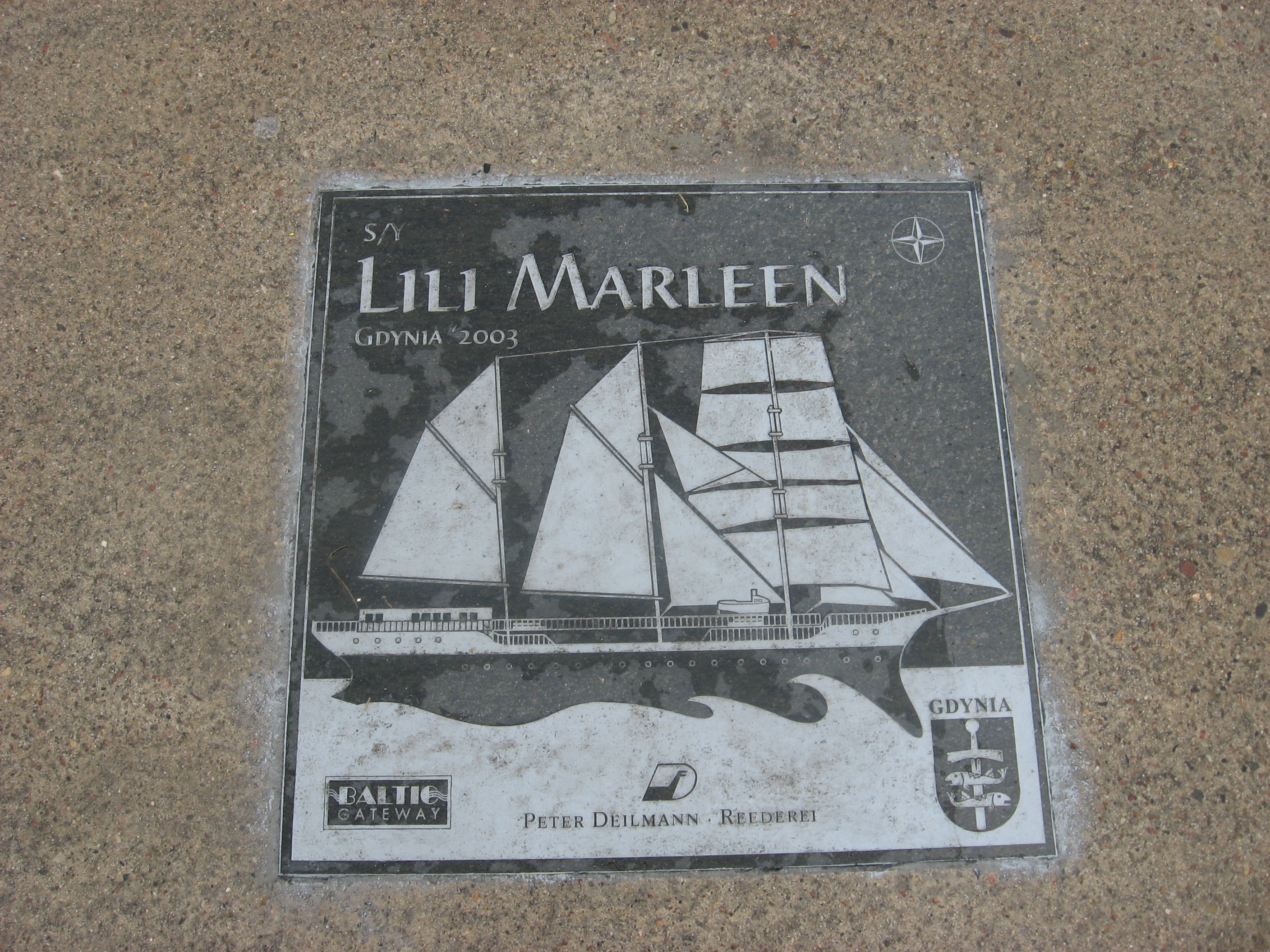 Aleja Statków Pasażerskich w Gdyni, tablica SY Lili Marleen